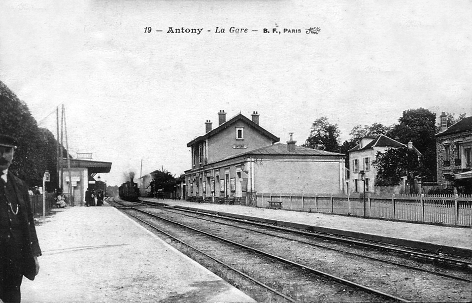 La gare d'Antony vers 1900, après son agrandissement par la Compagnie du chemin de fer d'Orléans en 1891.